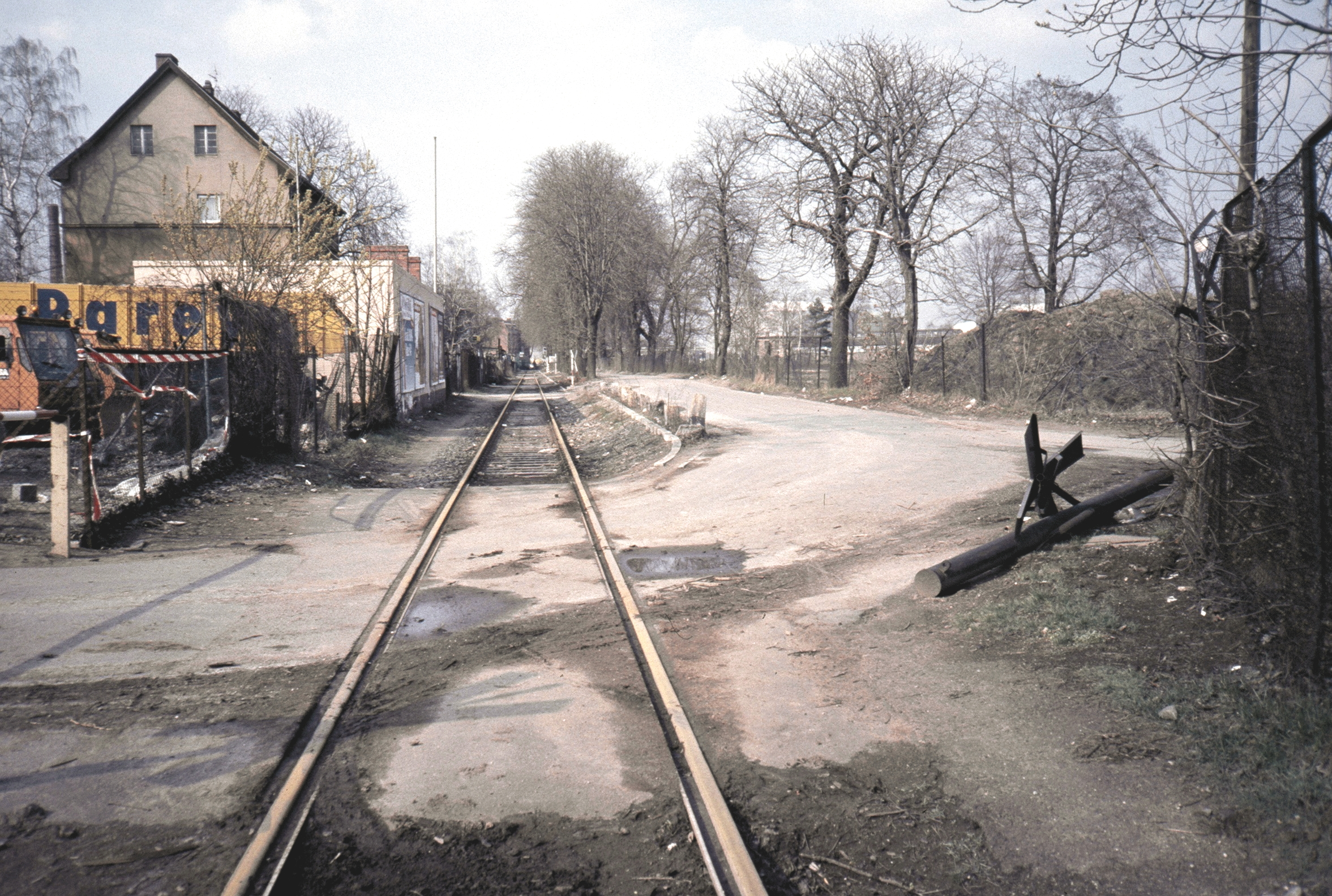 Berlin: Straße Salzhof mit Industriegleis